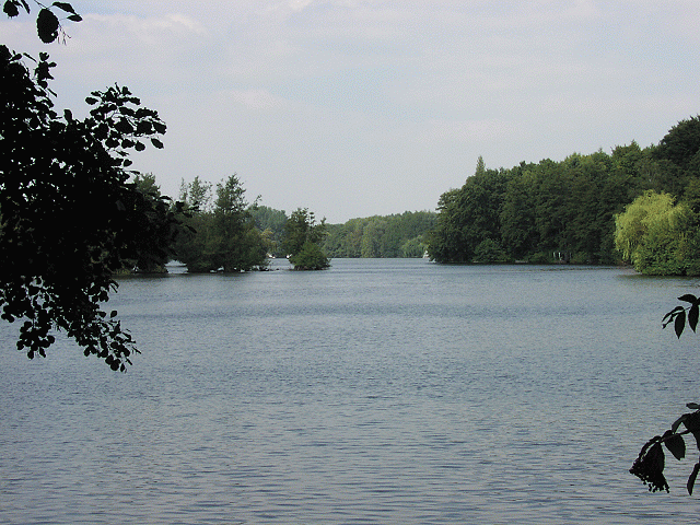 Ansicht des Hariksees am Niederrhein